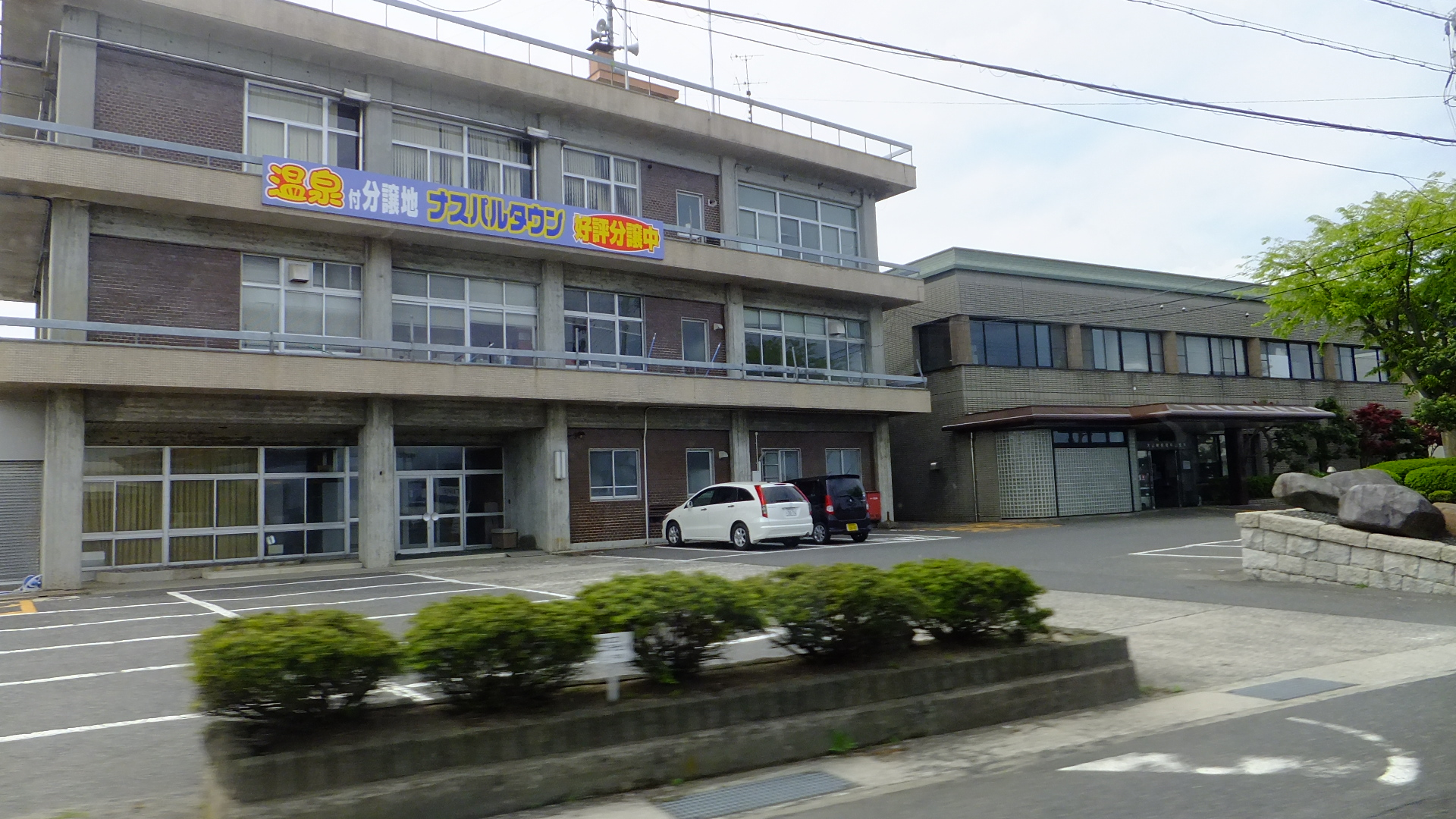 大山町役場中山支所